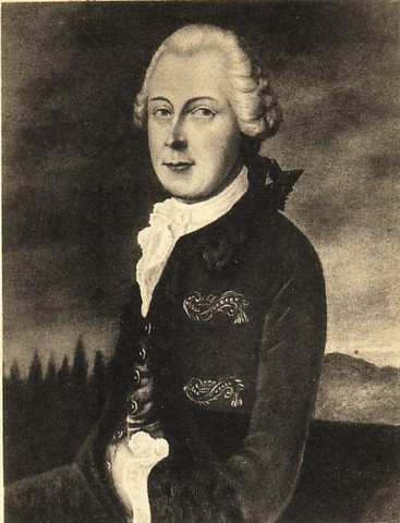 Porträt des Johann Christoph Georg von Hedemann